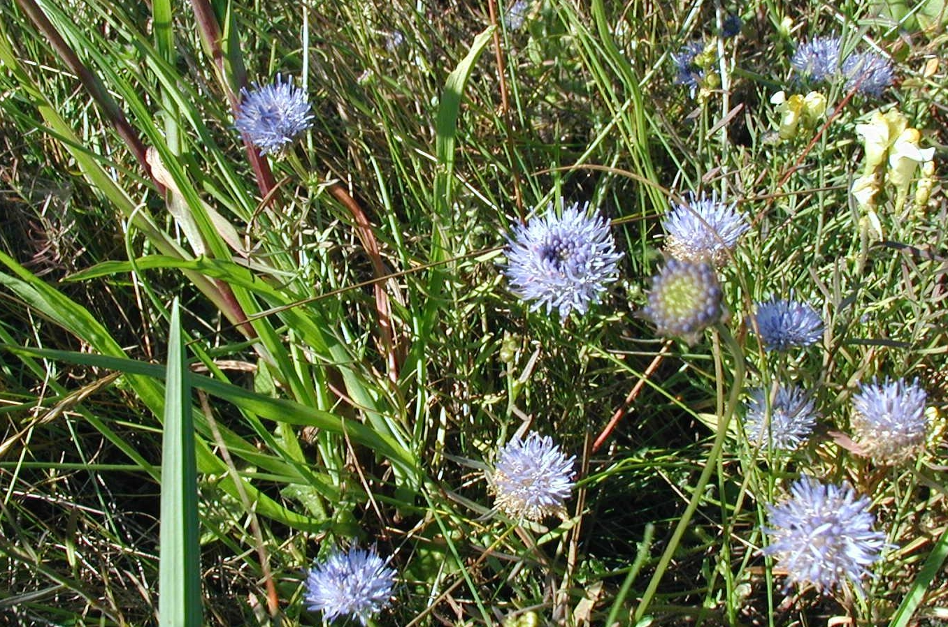 Jasione montana: Habit.